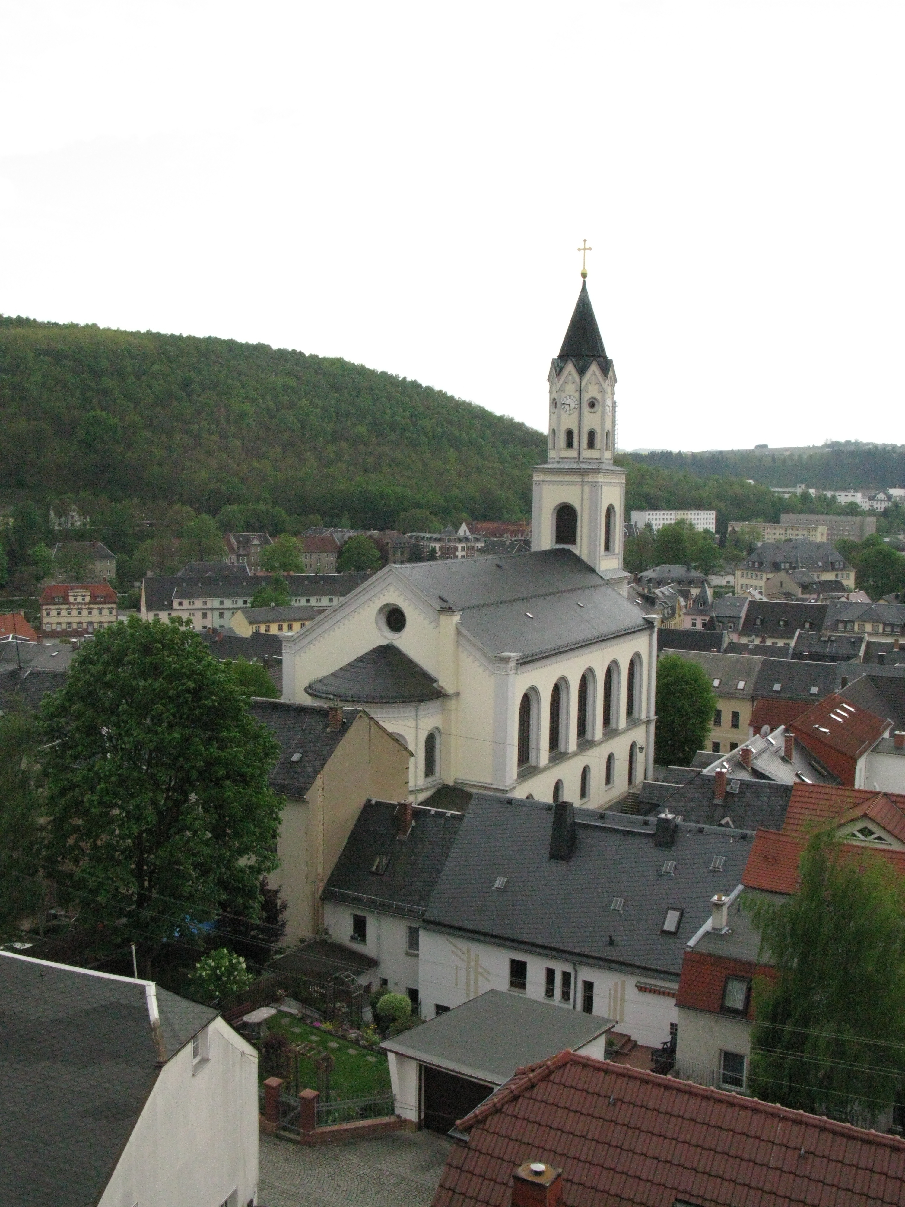 Elsterberg, Laurentiuskirche, gesehen von der Burgruine Elsterberg.